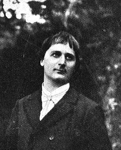 Emil Anner (1870–1925) Grafiker, Maler, Radierer, Bühnenbildner. Foto von G. Horlacher, Baden